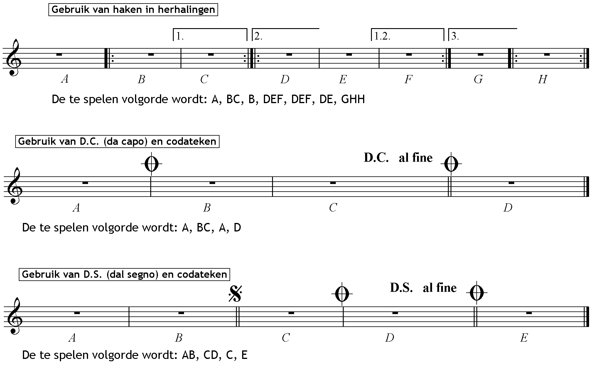 Verduidelijking muzieknotatie herhalingsstructuren